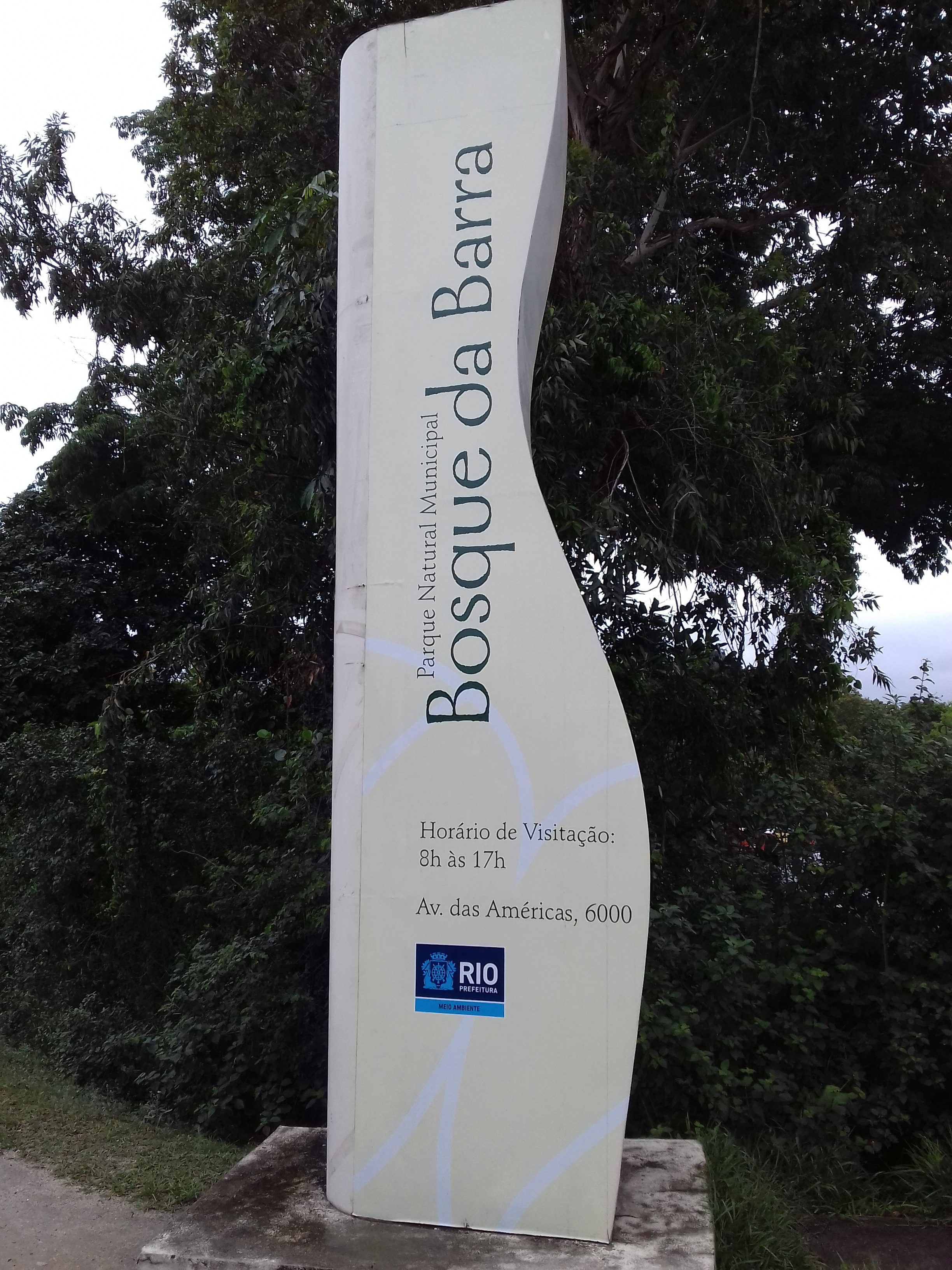 Bosque da Barra Schild am Eingang, Rio de Janeiro, RJ, Brasil